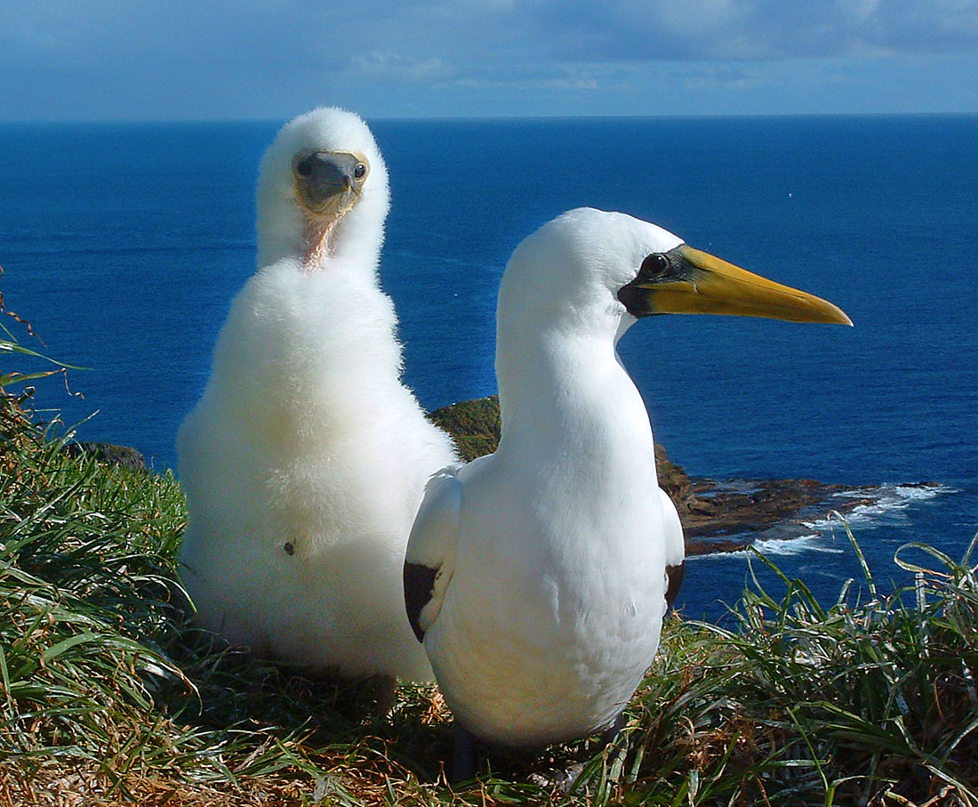 Masked Boobies, Norfolk Island.